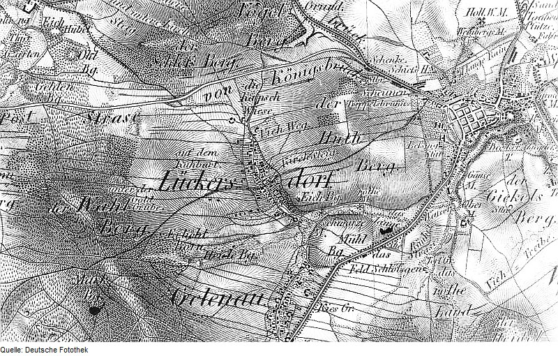 Original image description from the Deutsche Fotothek Kamenz-Lückersdorf. Oberreit, Sect. Bautzen, 1844/46